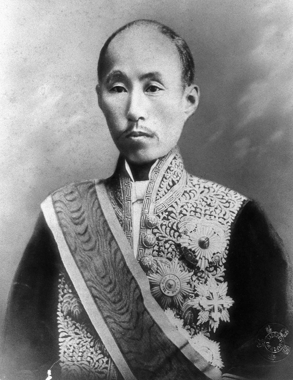 Portrait of Sanjo Sanetomi (三条実美, 1837 – 1891)